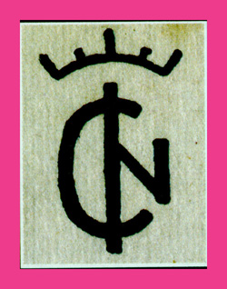 hola hola